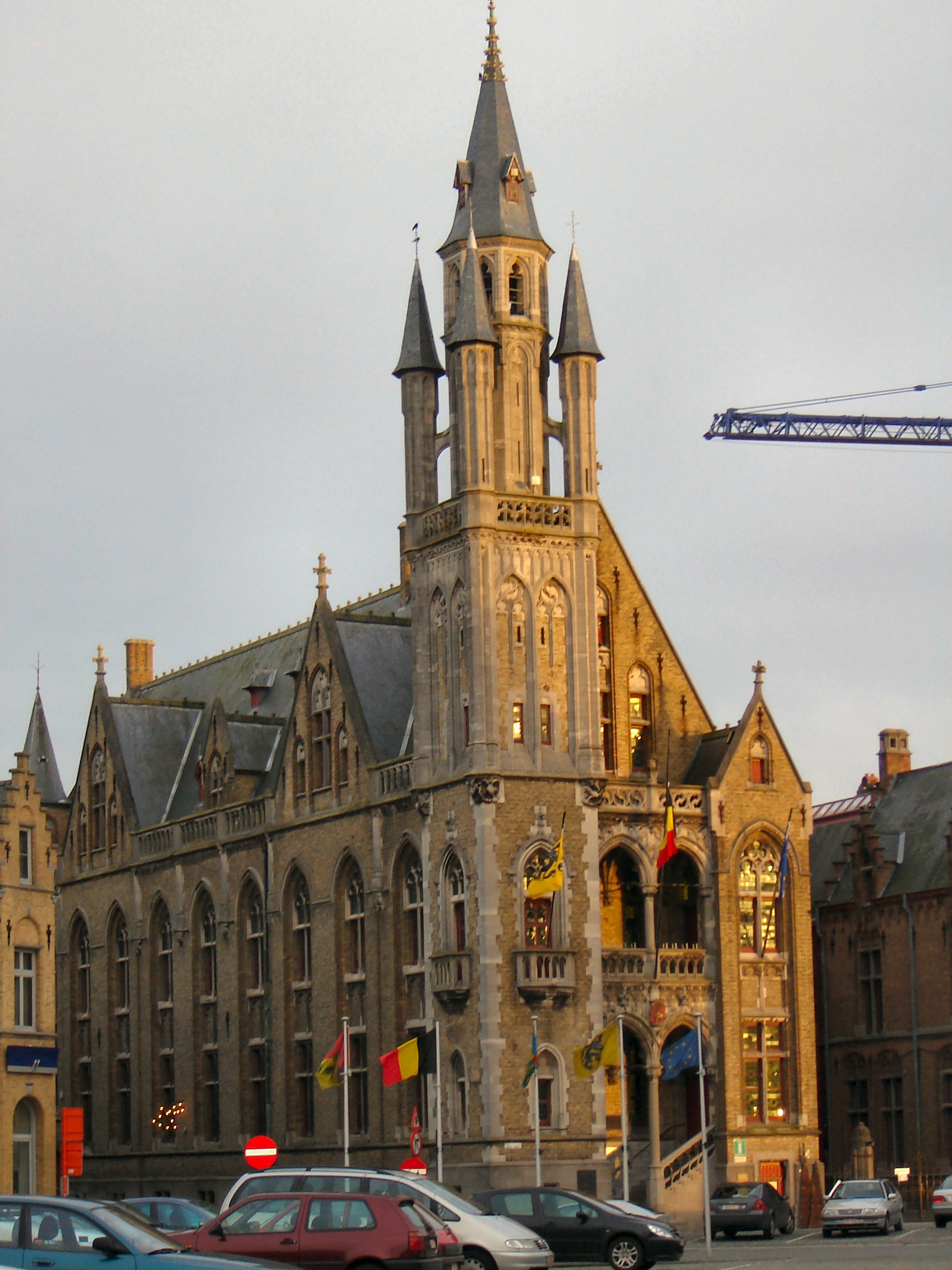 Stadhuis van Poperinge. City Hall of Poperinge, West-Flanders, Belgium